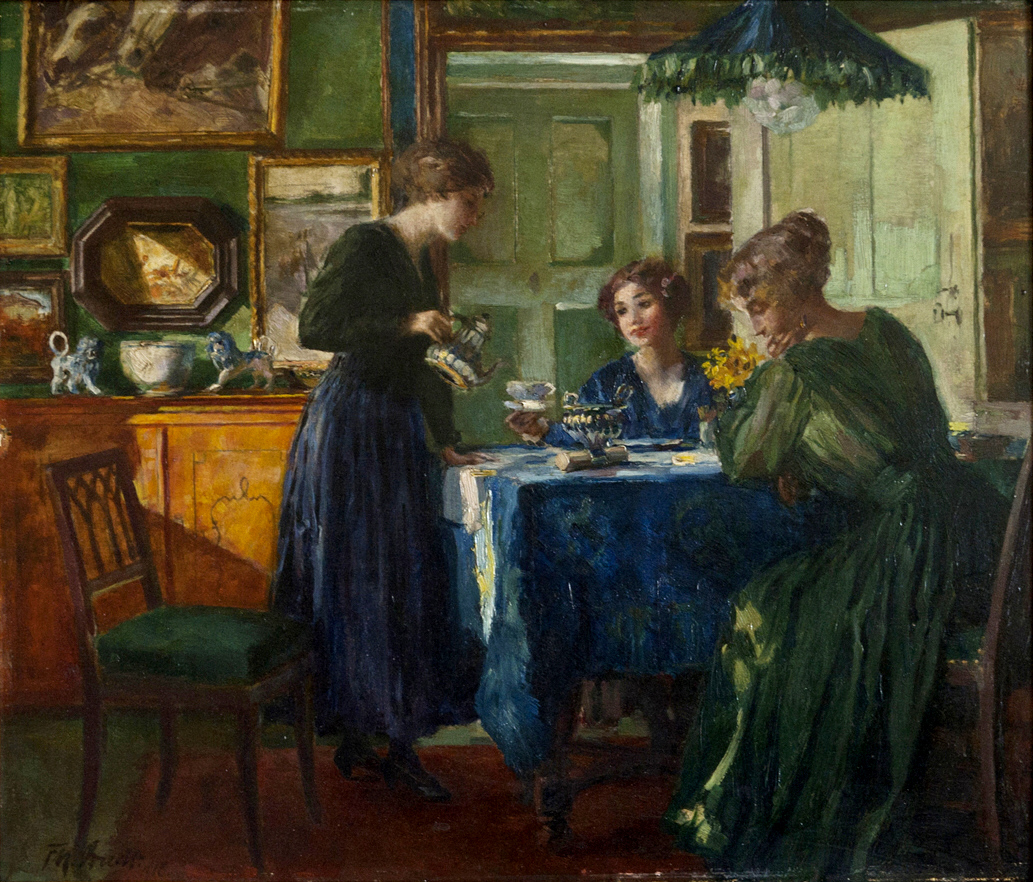 Frühstück zu Kriegszeiten (rückseitig original betitelt), Öl auf Holz, ca. 48 x 57 cm